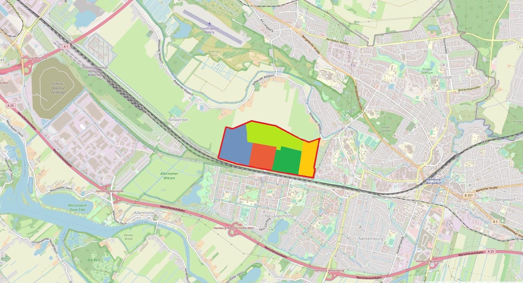 Karet auf Basis von Openstreetmap, eingezeichnet sind die ungwefären Grenzen des Planungsgebiets und der Quartiere auf Basis des Masterplans Oberbillwerder, Stand Januar 2019. This map may be incomplete, and may contain errors. Don't rely solely on it for navigation.